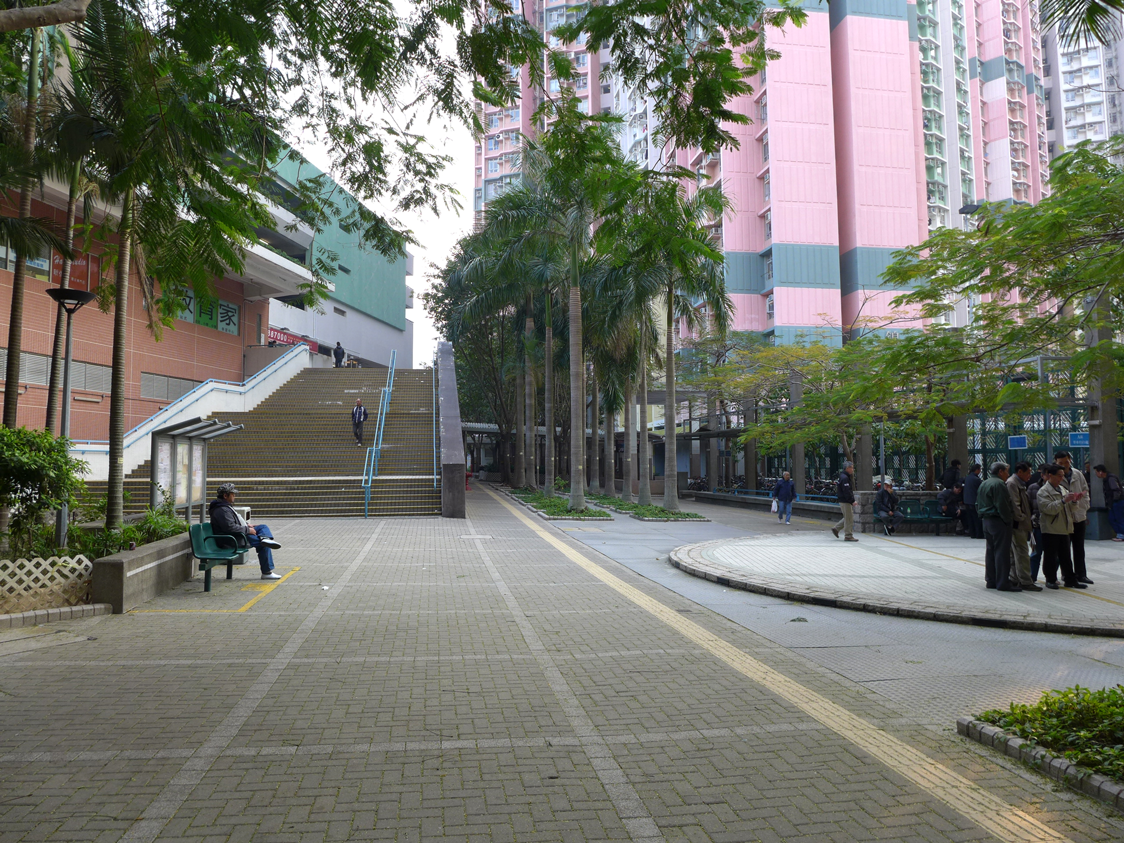 Chung On Estate Open Space